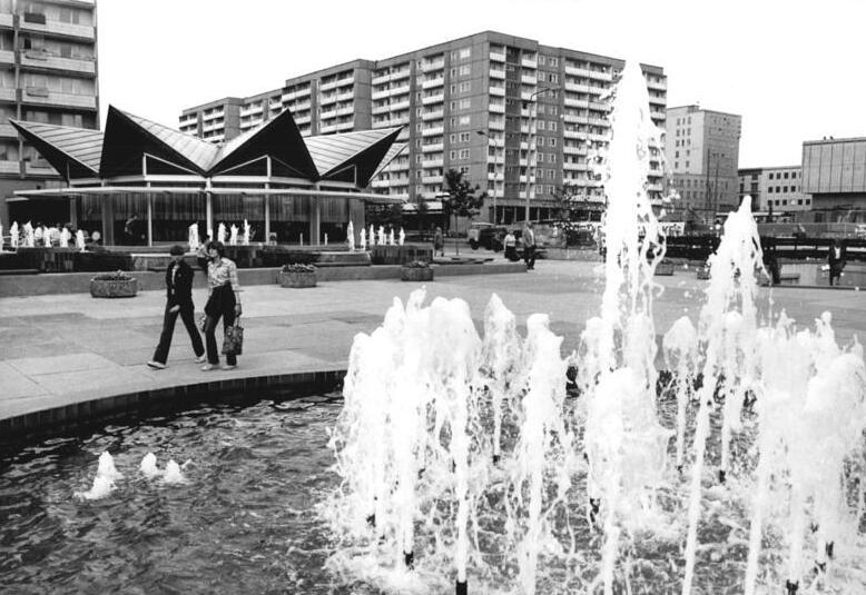 Gera, Platz der Republik ADN-ZB Liebers-20.5.81-pe. Gera: Schöne DDR. Wasserspiele und Blumen geben dem Geraer Stadtzentrum ein freundliches Gepräge, z.B. am Platz der Republik. Im Zentrum entstanden in den vergangenen Jahren mehrere Hundert Neubauwohnungen. (siehe 4N) Information added by Wikimedia users.